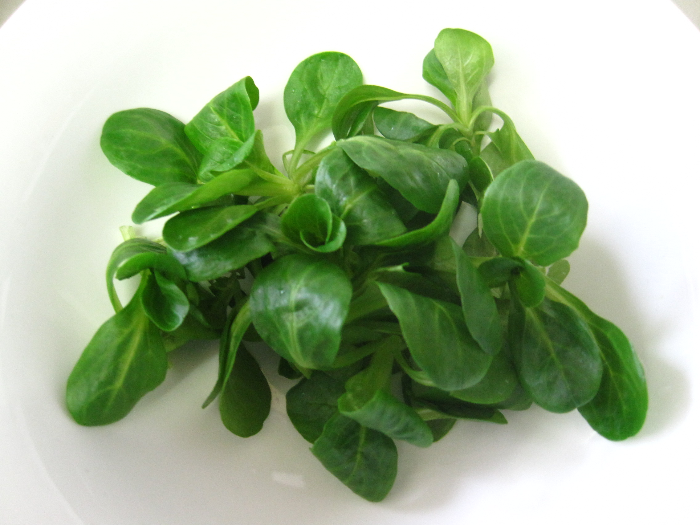 Матиловац Моја слика (и мој ручак) Licensing